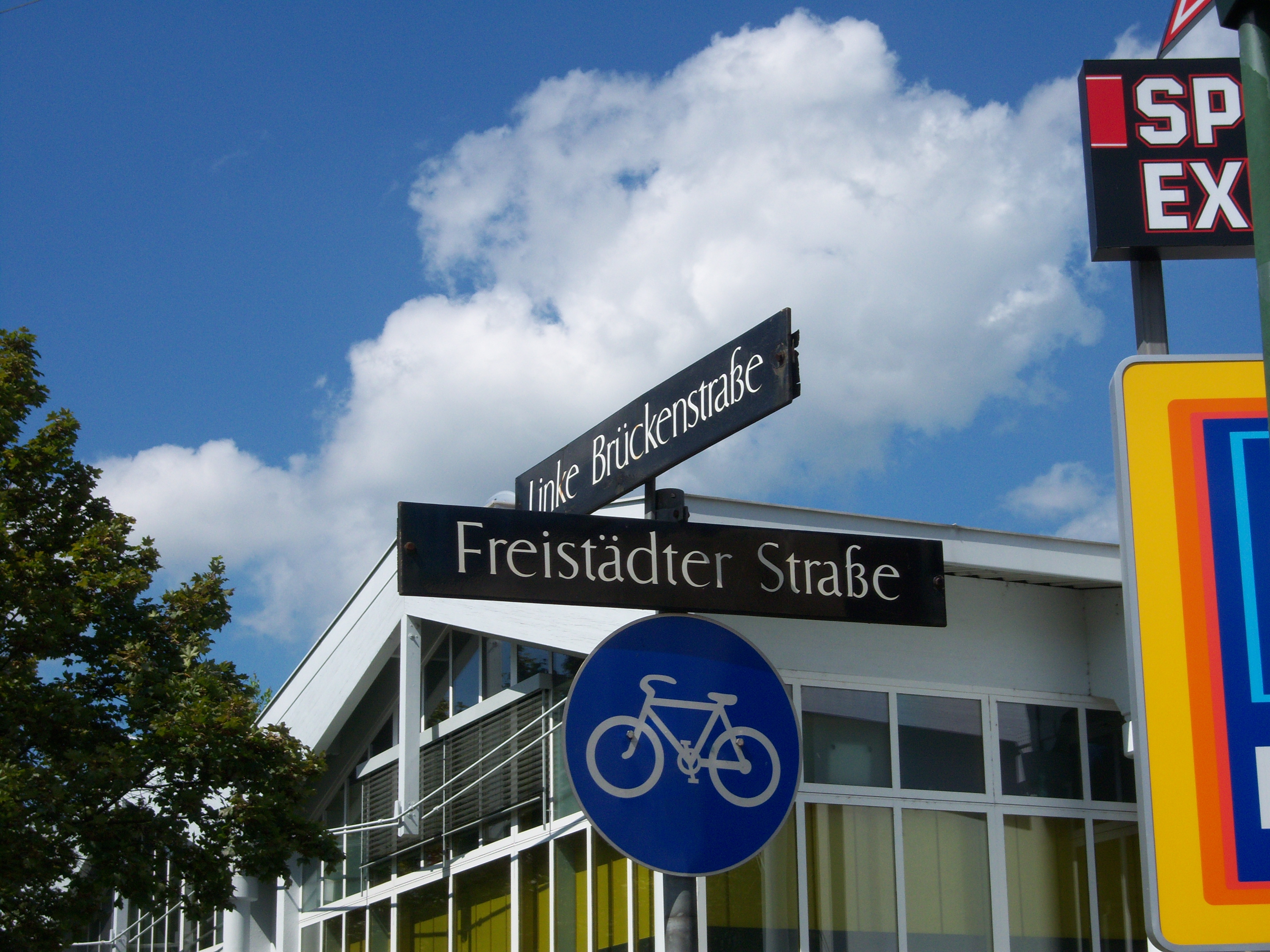 Neues Straßenschild in Linz